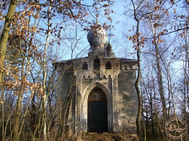 cerkiew prawosławna św. Jerzego w Chróścinie